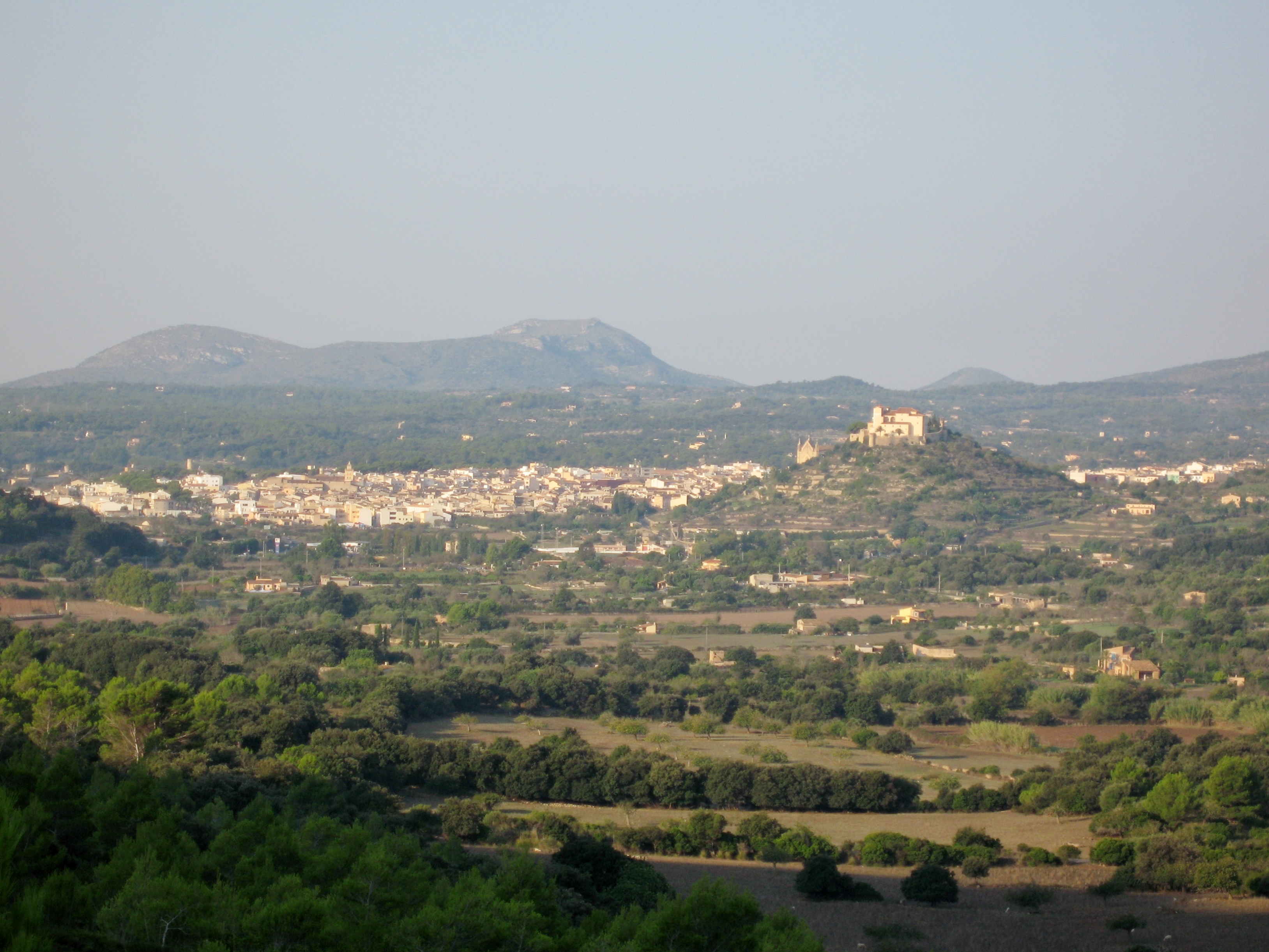 Artà, Mallorca, Spain